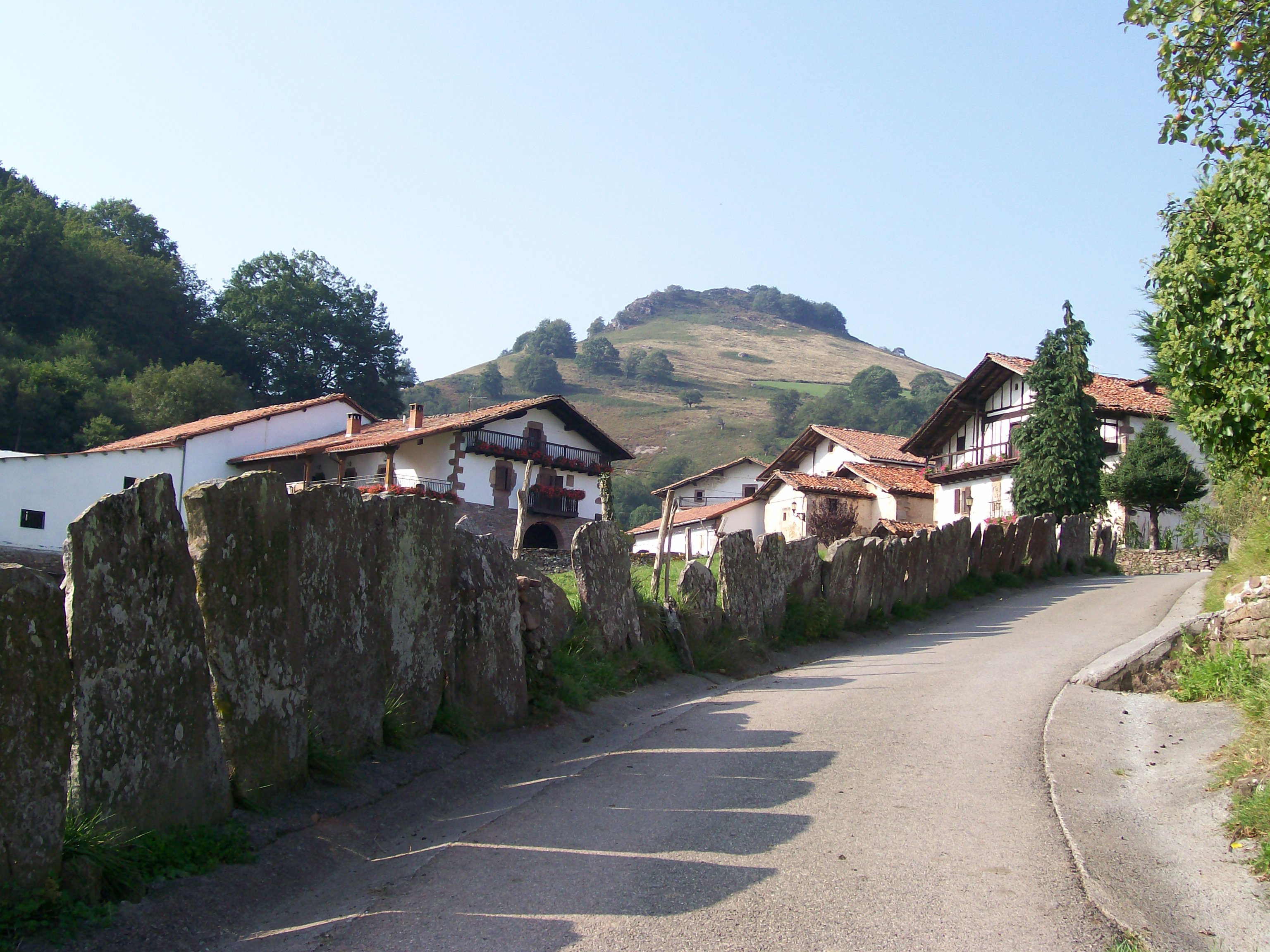 Baztango Azpilikueta herriko Apaioa auzoaren ikuspegia